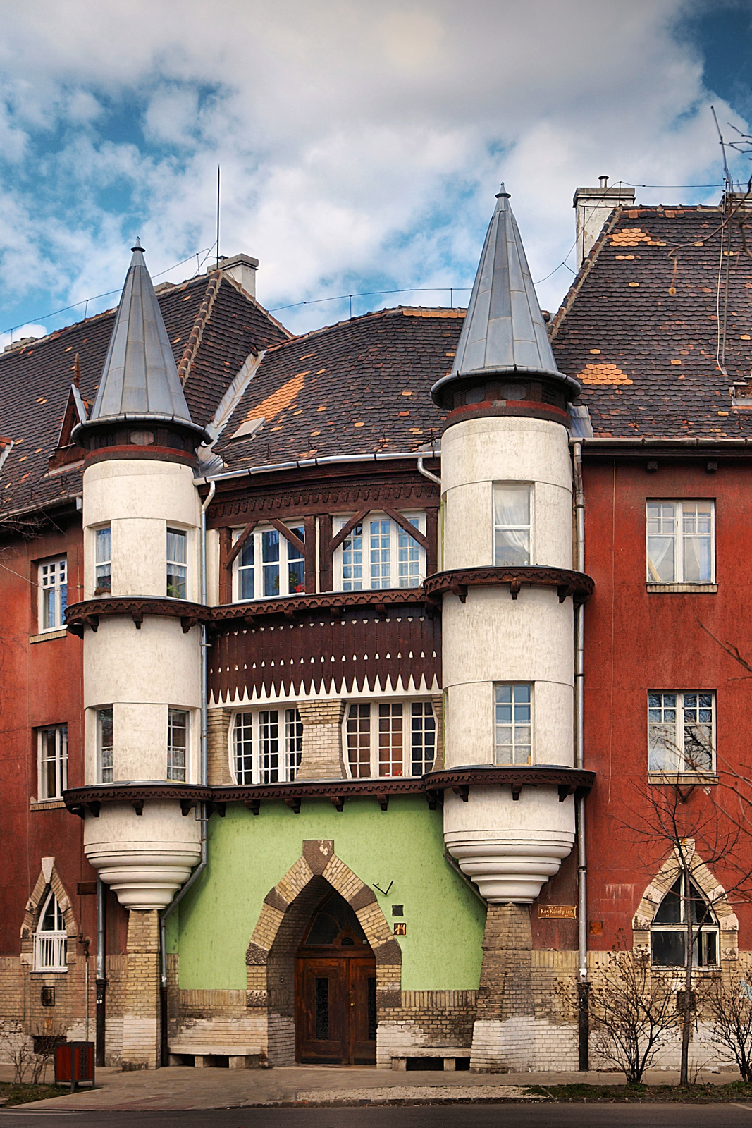 Lakóház (Budapest 19, Kós Károly tér 14.) This is a photo of a monument in Hungary, Identifier: 1266